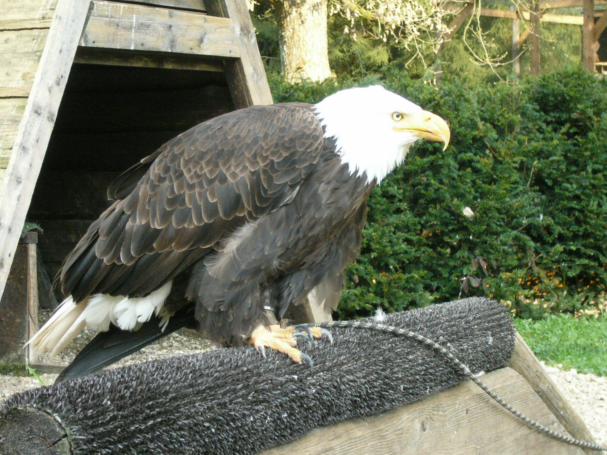 Weißkopfseeadler Daisy Harzfalkenhof Bad Sachsa